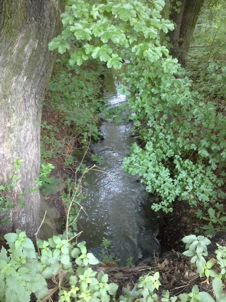 Ovčárenský potok "u Bažantnice"